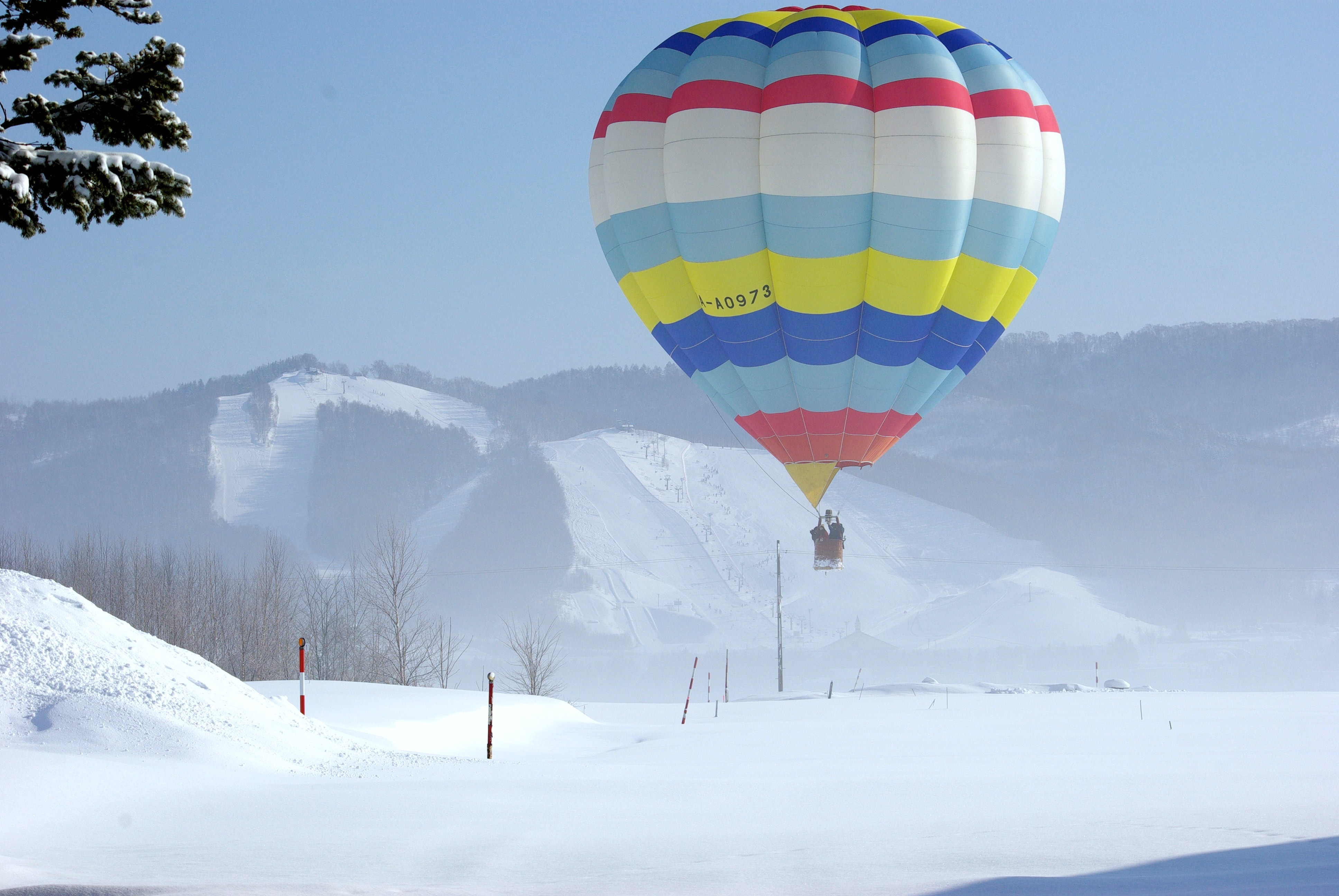 和寒町東山スキー場